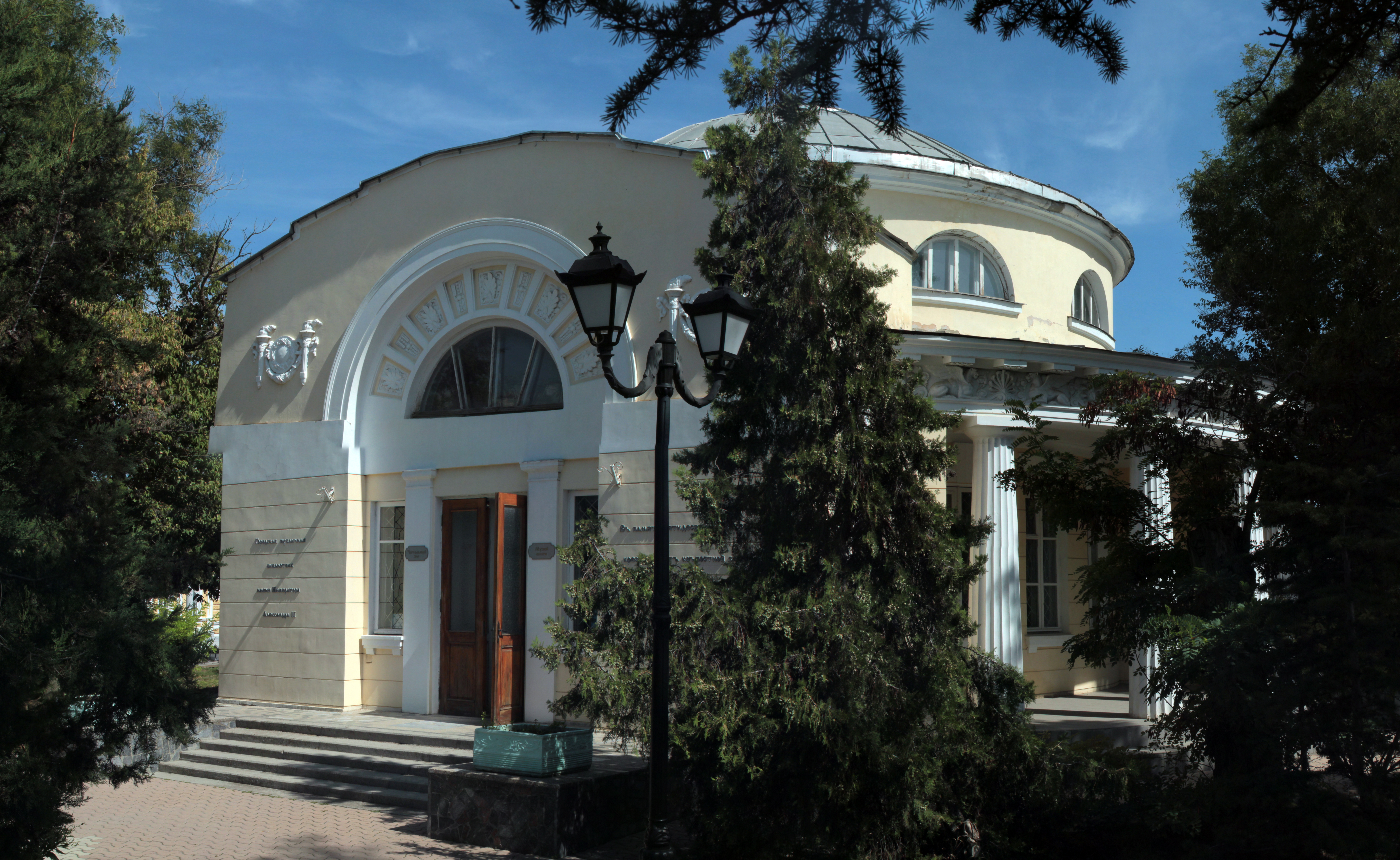 Будівля колишньої публічної бібліотеки ім. Олександра II, Євпаторія, пр. А. Ахматової, 23 (колишня вул. Бр. Буслаєвих)